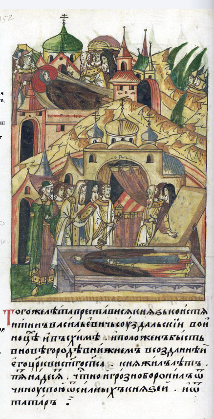 ЛИЦЕВОЙ ЛЕТОПИСНЫЙ СВОД В том же году преставился князь Константин Васильевич Суздальский, иноком, в схиме, и положен был в Нижнем Новгороде в созданной им церкви святого Спаса. Княжил лет пятнадцать, честно и грозно стерег свою отчину от сильных князей и от татар.